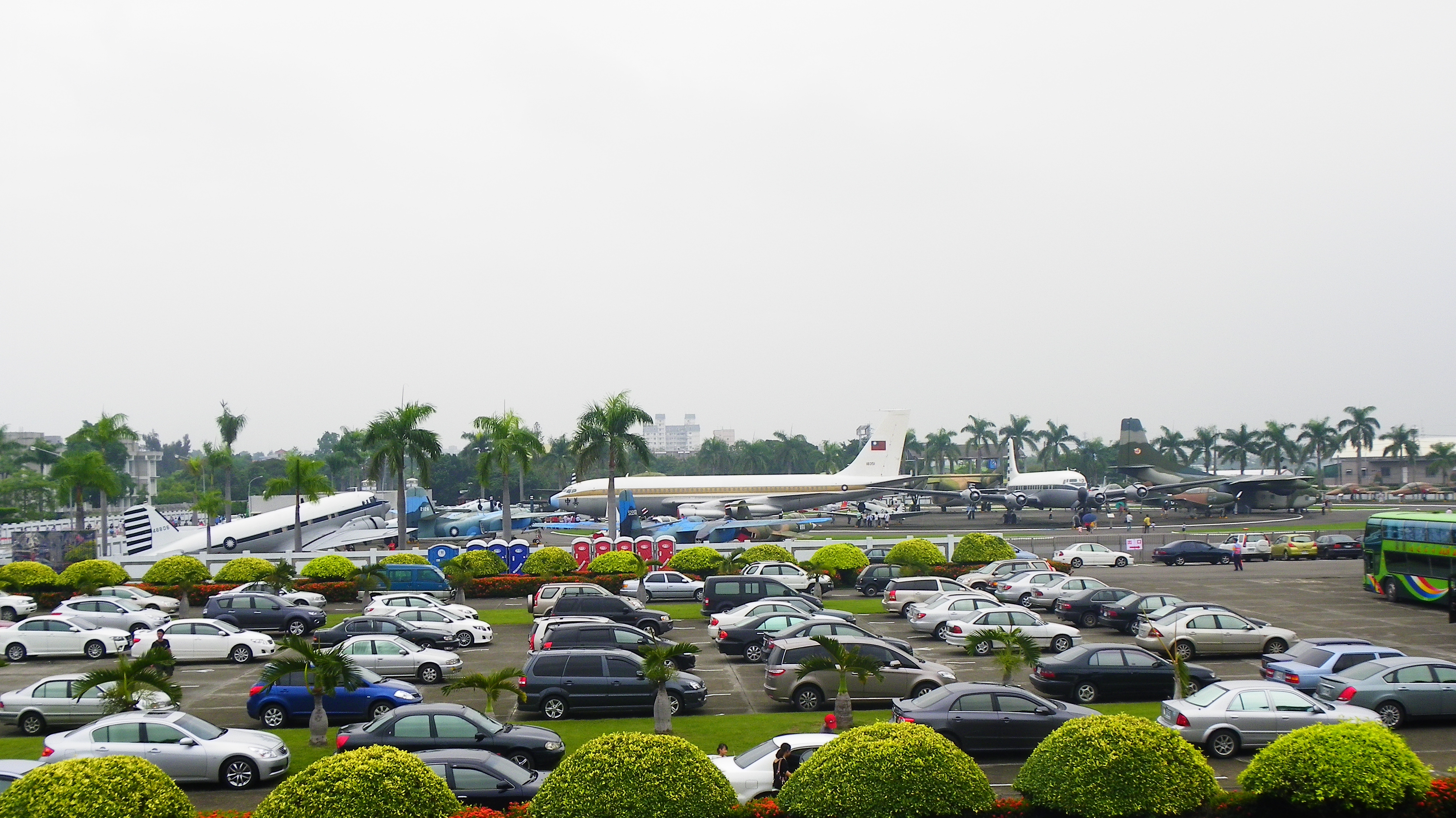 岡山空軍官校軍機展示場西側鳥瞰，攝於2011年空軍岡山基地營區開放活動。